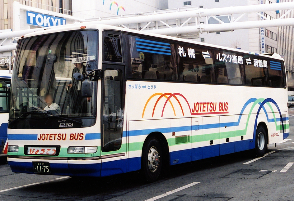 じょうてつバス 日野・セレガGD